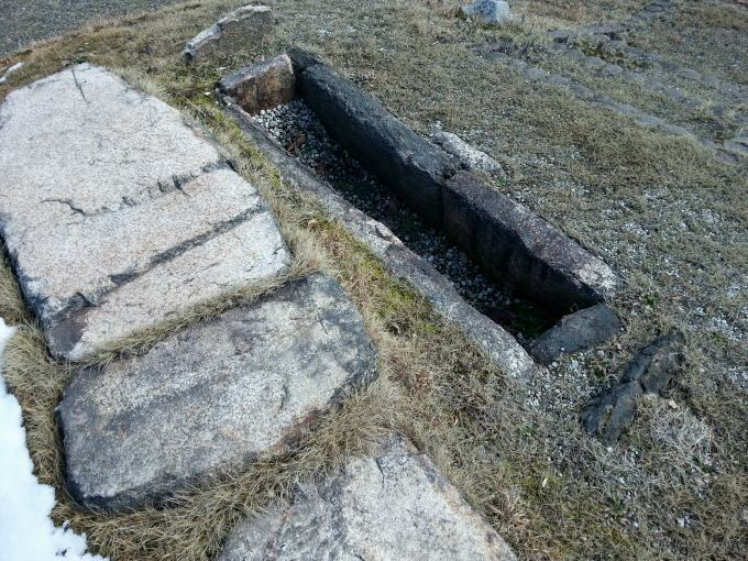 大谷古墳の石室